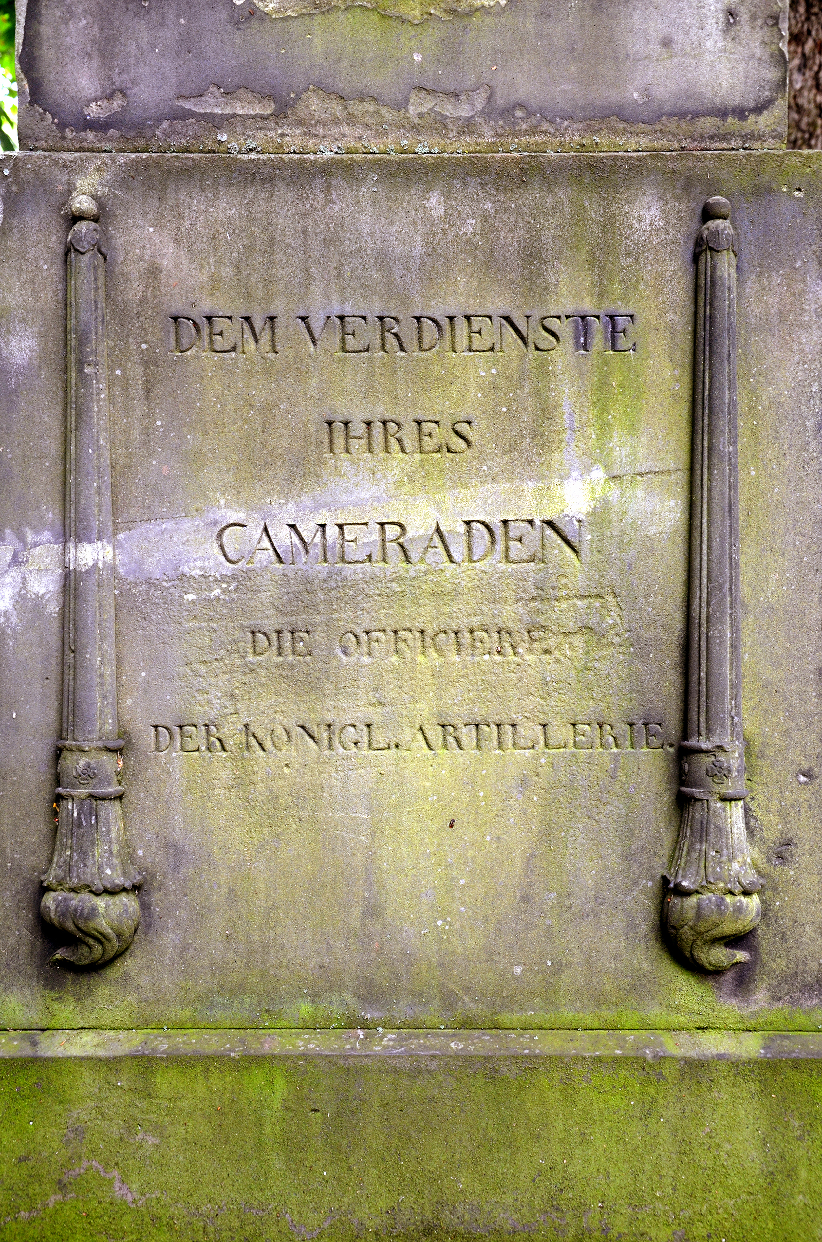 Inschrift auf einer Seite des Grabstein-Obelisken von Georg Wilhelm Müller (1785-1843) ...